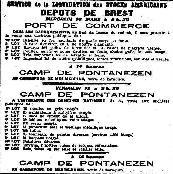 Placard publicitaire annonçant la mise en vente de stocks américains à Pontanézen à Brest (Ouest-Eclair n°7356 du 9 mars 1920)